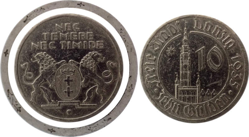 10 guldenów 1935 WMG, Ratusz Głównego Miasta w Gdańsku.